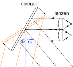 Lidar hoogte meting